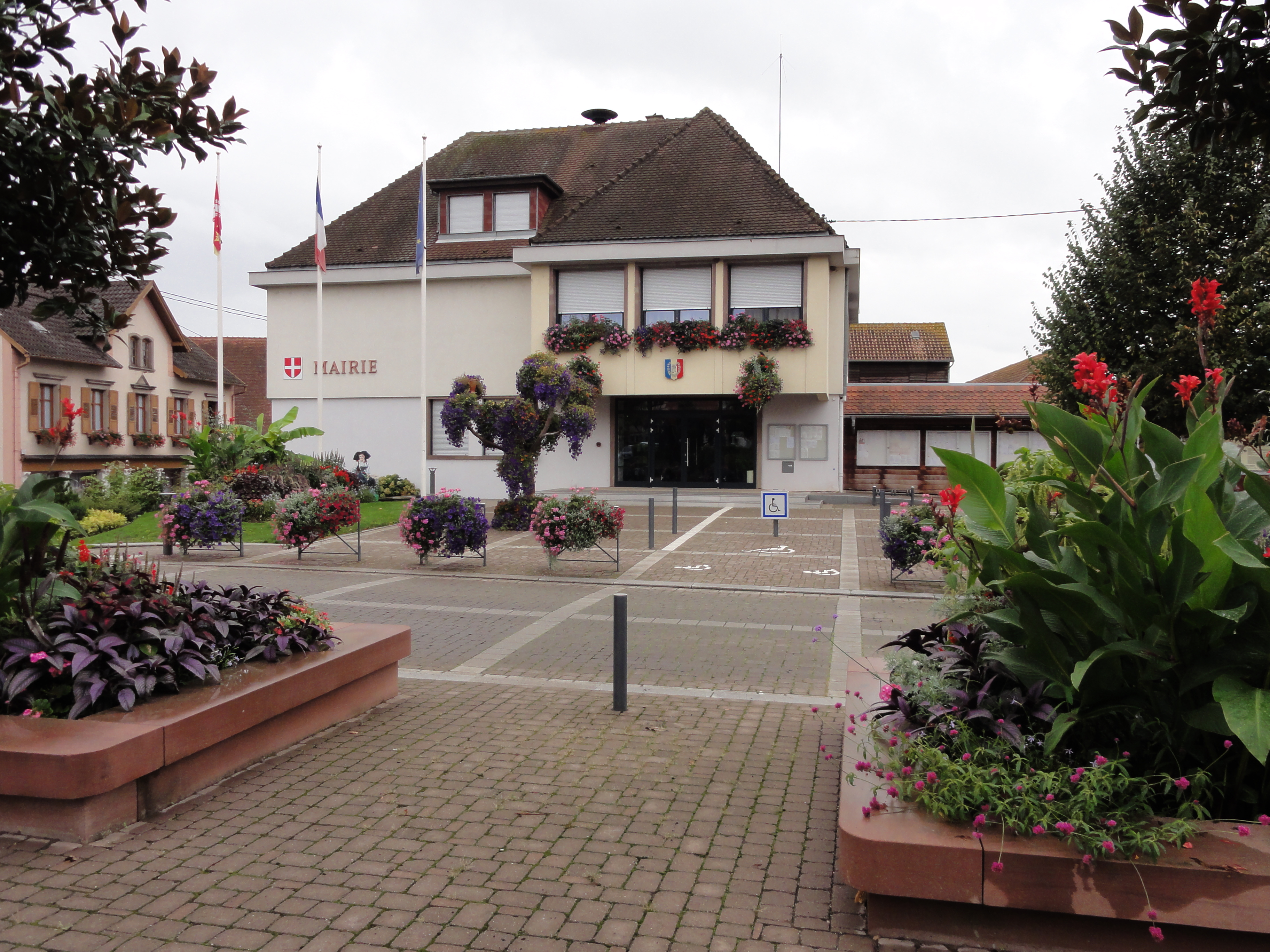 Alsace, Bas-Rhin, Mommenheim, Mairie.